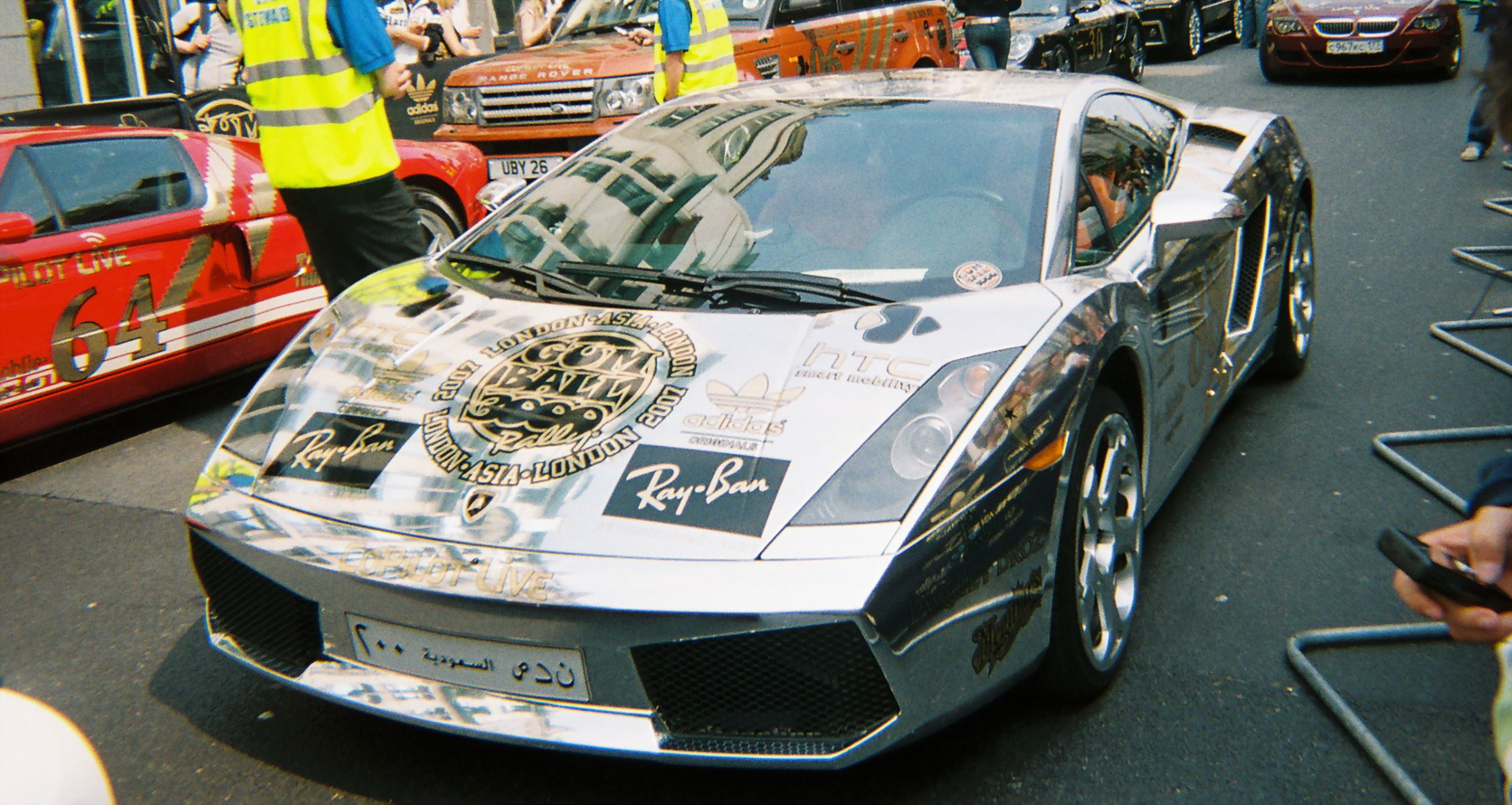 Lamborghini Murcielago - Gumball 3000 2007